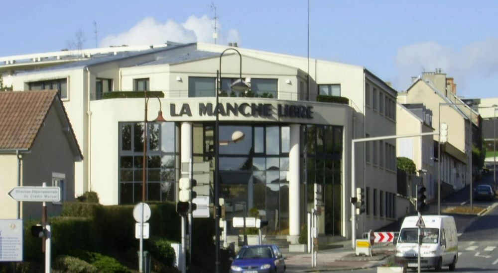 Bâtiment principal du journal La Manche Libre